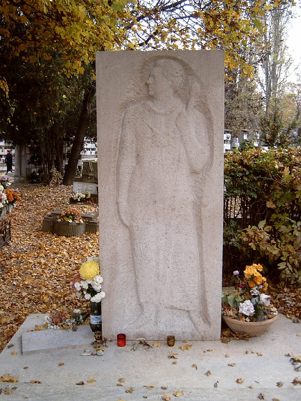 Székely Mihály (Jászberény, 1901. máj. 8. – Bp., 1963. márc. 22.) basszus hangfekvésű énekművész sírja Budapesten. Farkasréti temető: 43/1-1-15/16 [szobrász: Kovács Ferenc].